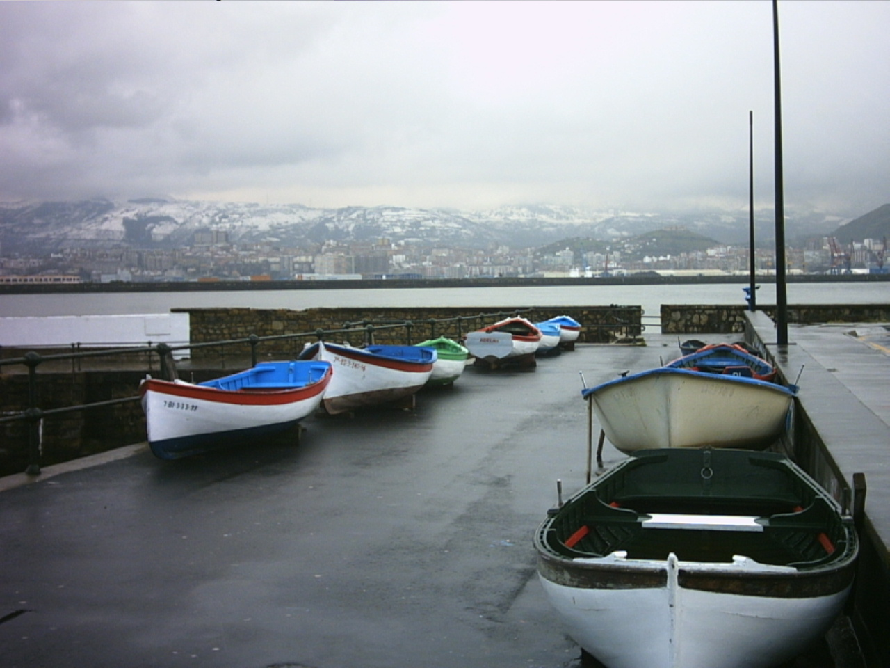 Puerto Viejo de Algorta. Al fondo, Portugalete y Santurtzi.